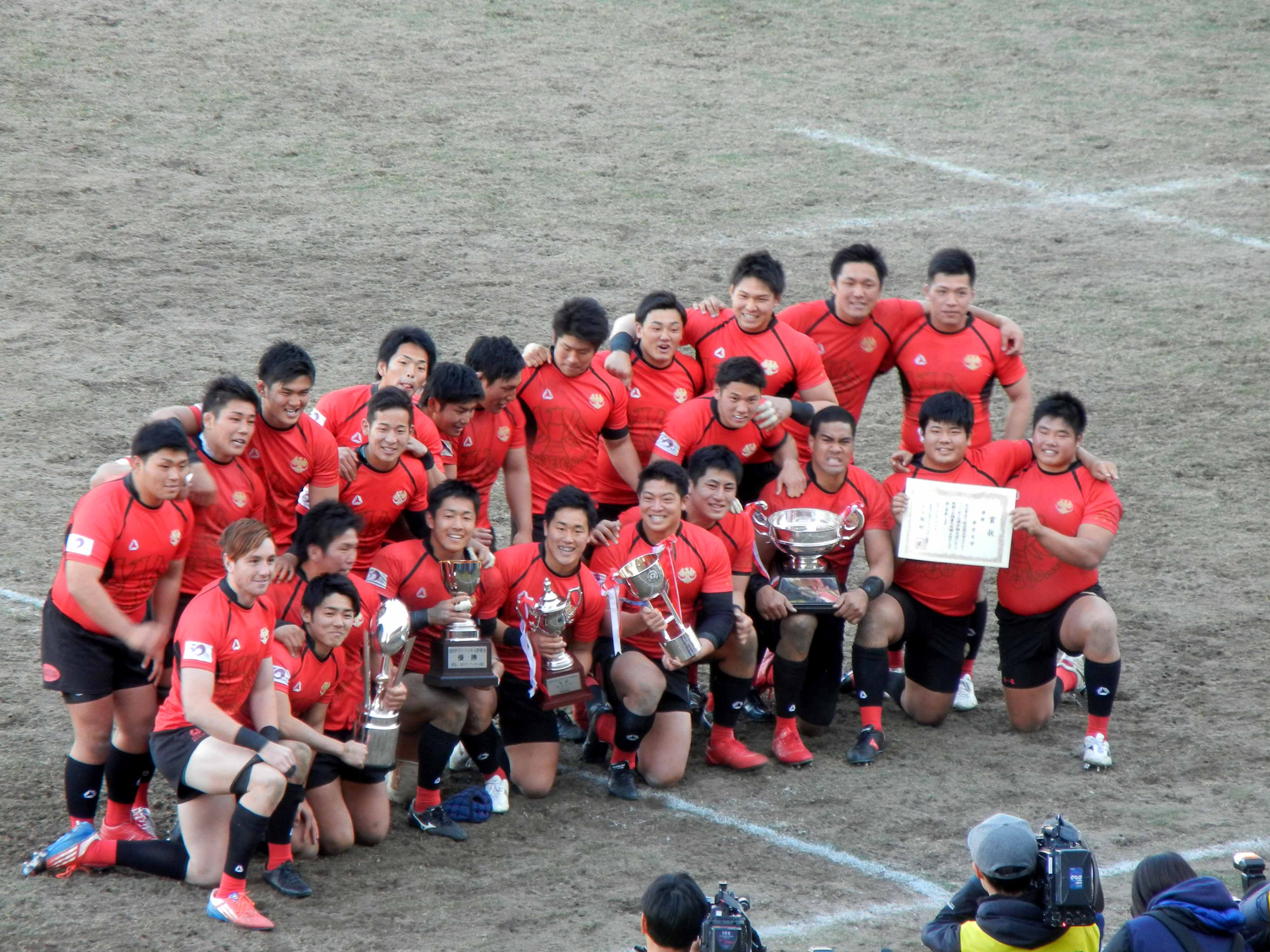 第52回ラグビー大学選手権優勝 帝京大学ラグビー部